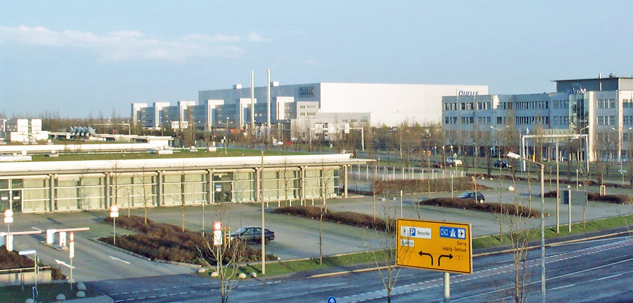 Quelle Versandzentrum Leipzig-Mockau